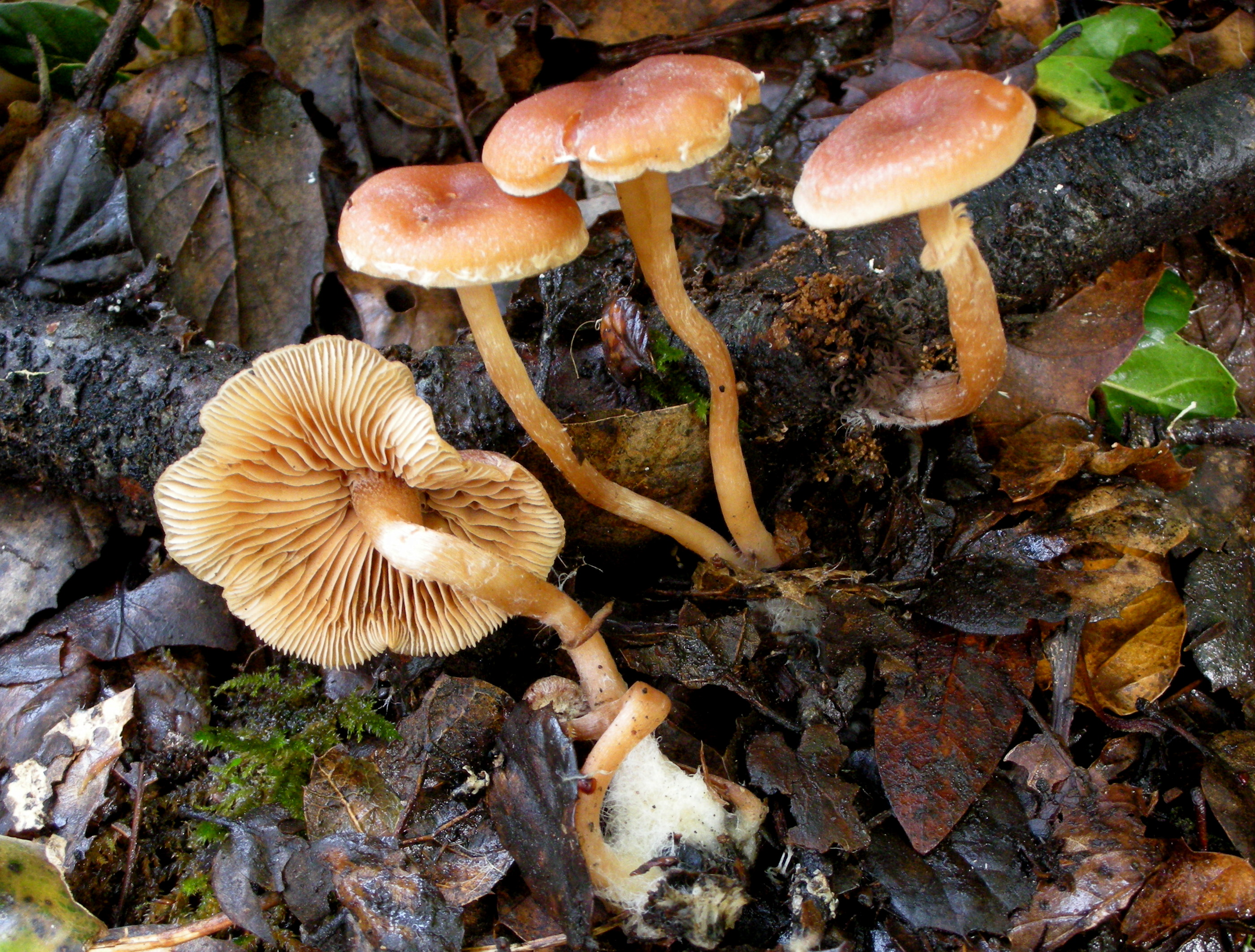 Tubaria furfuracea (Pers.) Gillet